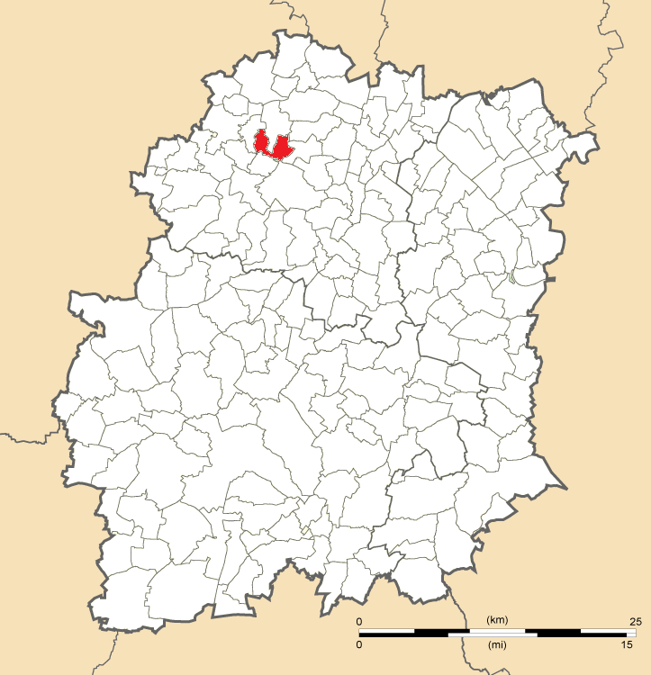 Carte de position des Ulis en Essonne